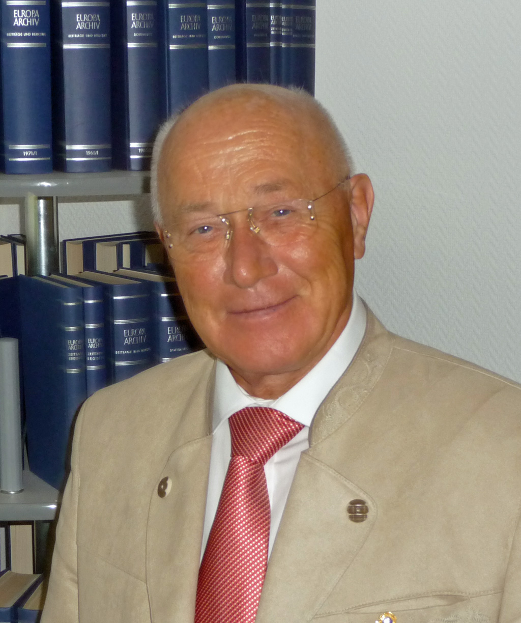 Heiner Timmermann in seinem Büro in der Akademie Rosenhof e.V.